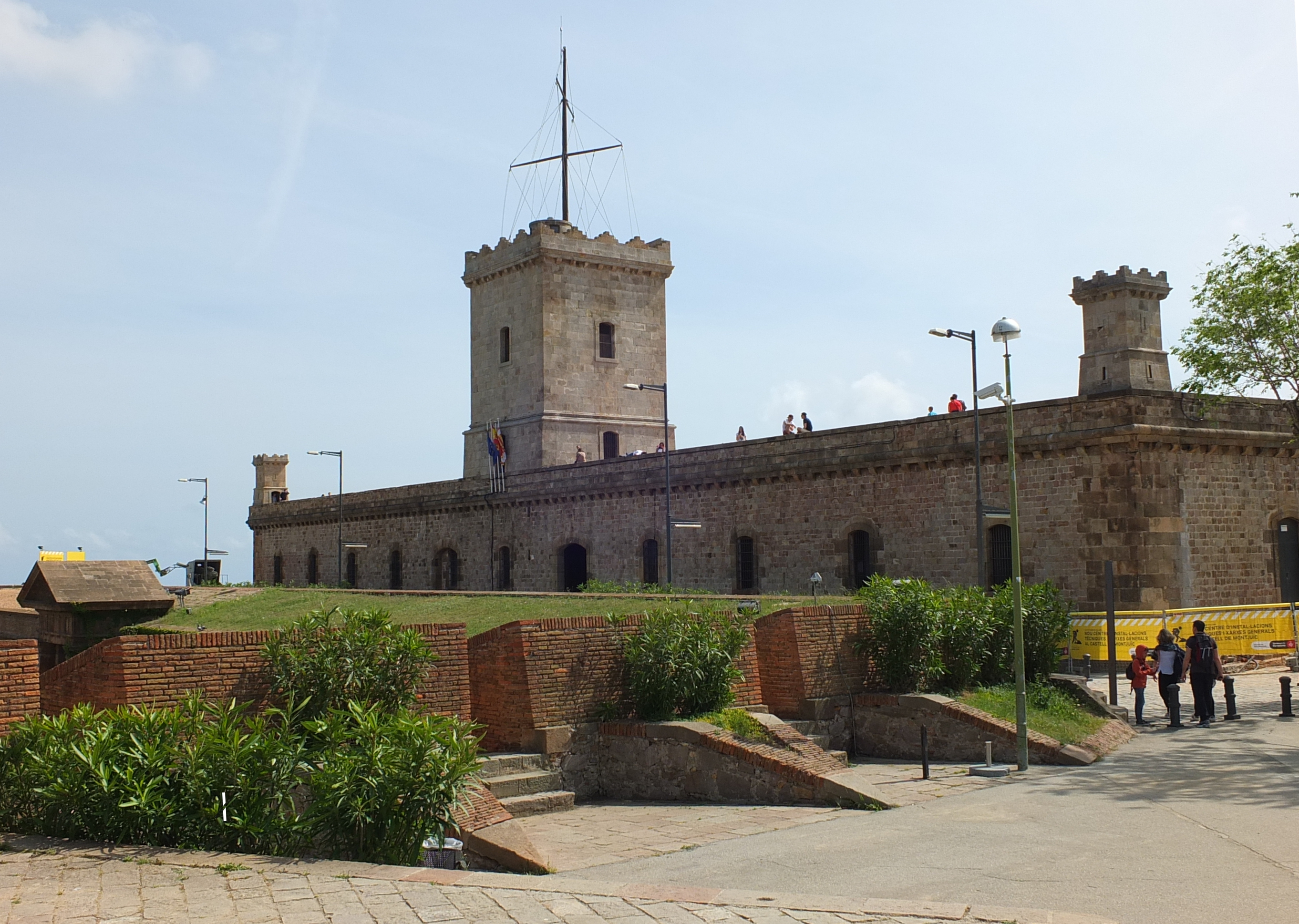 Het kasteel van Montjuïc, in Barcelona.